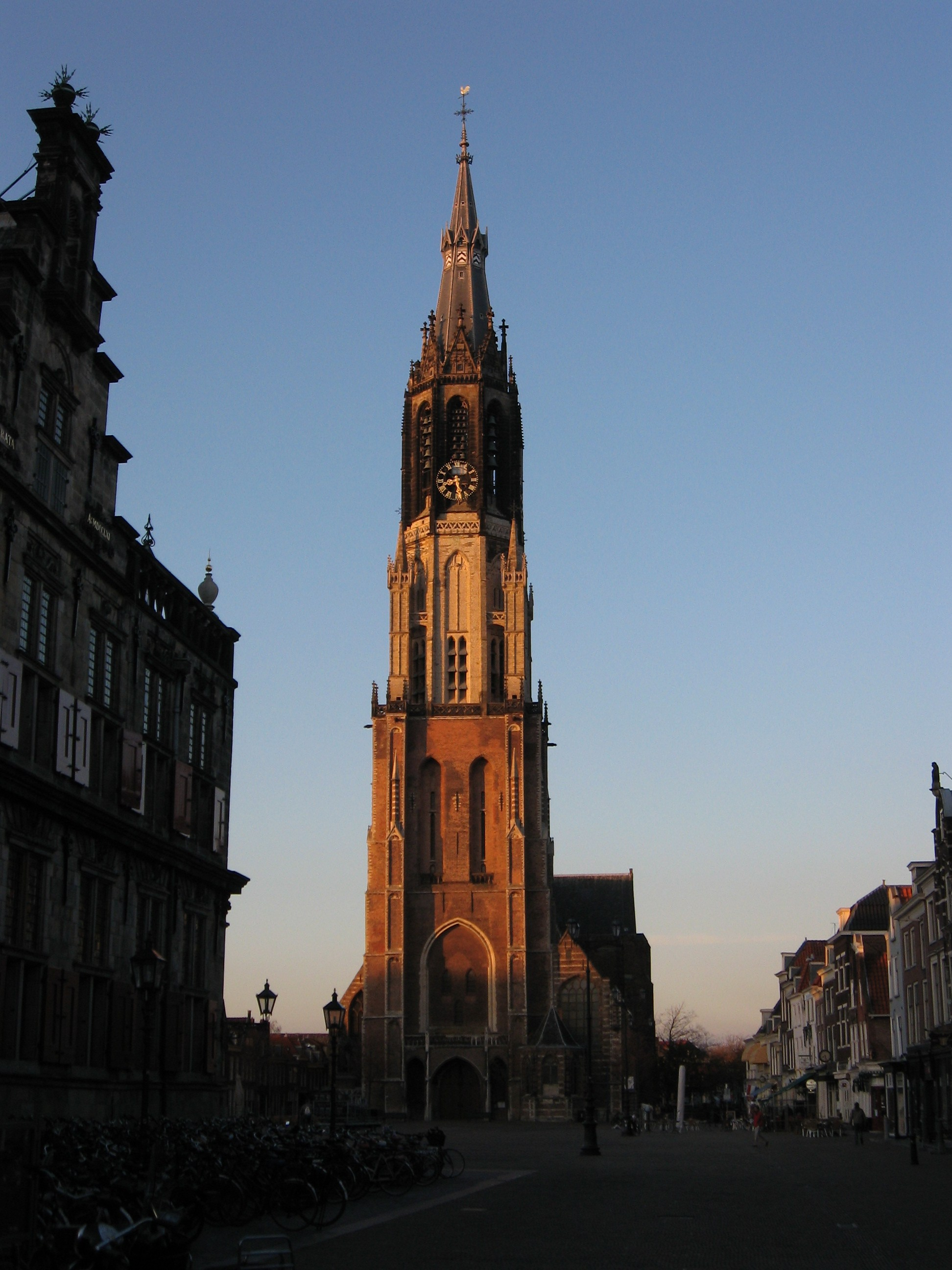 Delft - Church in the evening sun.jpg, rijksmonument